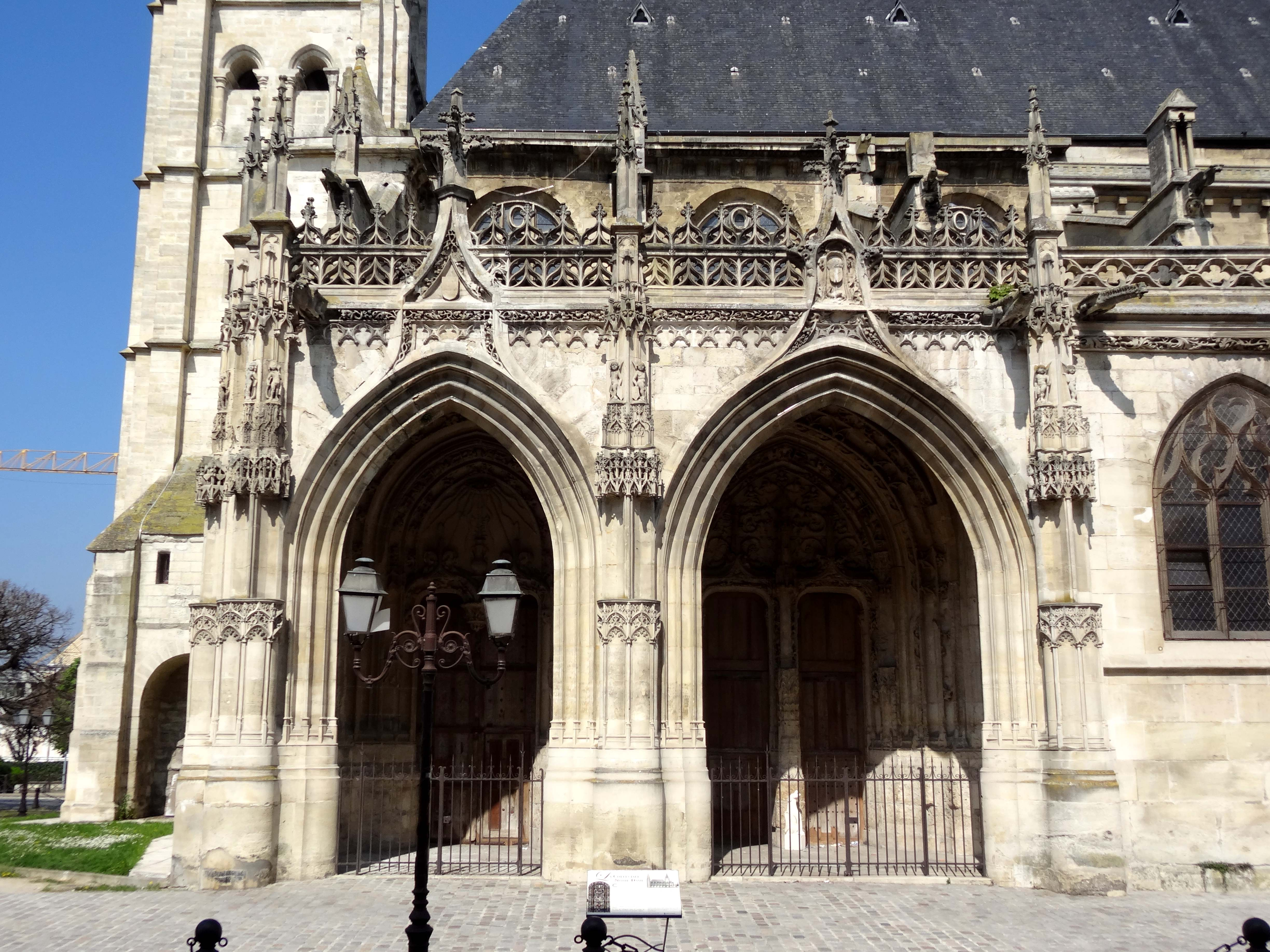 Collégiale Notre-Dame de Poissy - voir titre.